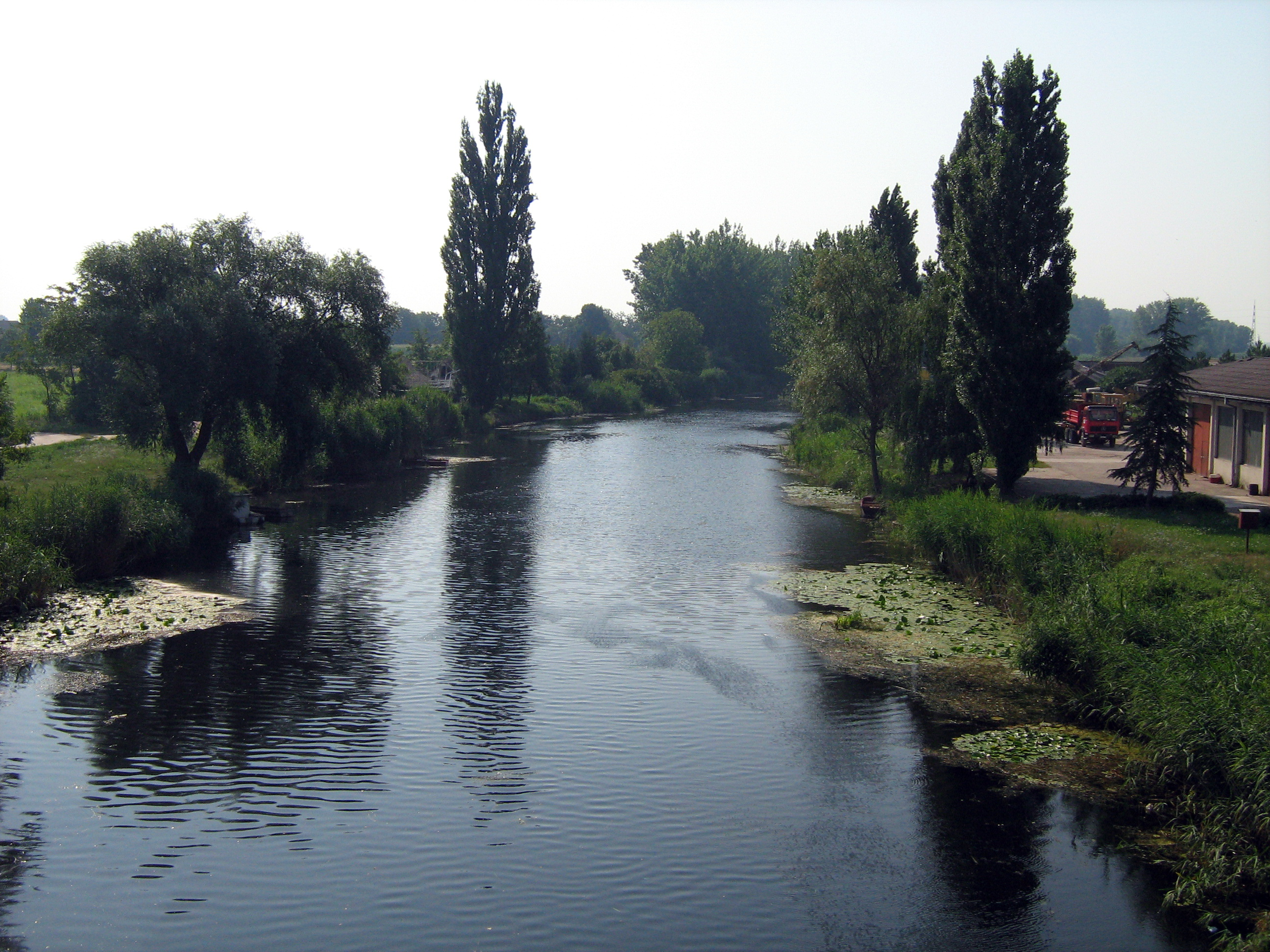 Велики Бачки канал код Сомбора